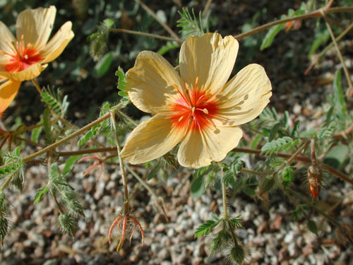 Kallstroemia grandiflora, Summer Poppy. Gilbert, Arizona, USA.